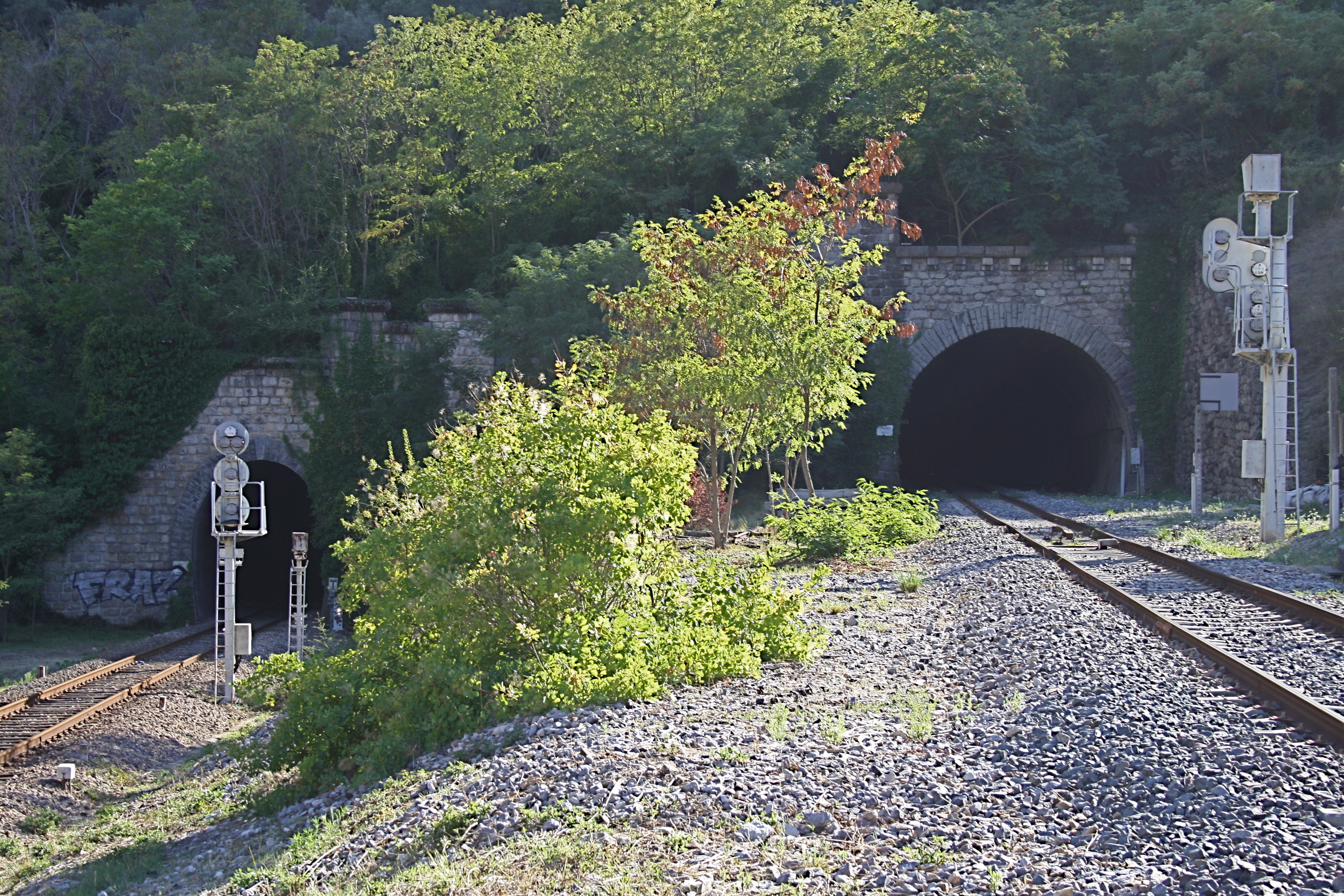 Die Tunnel von Breil-sur-Roya, links SNCF, rechts FS